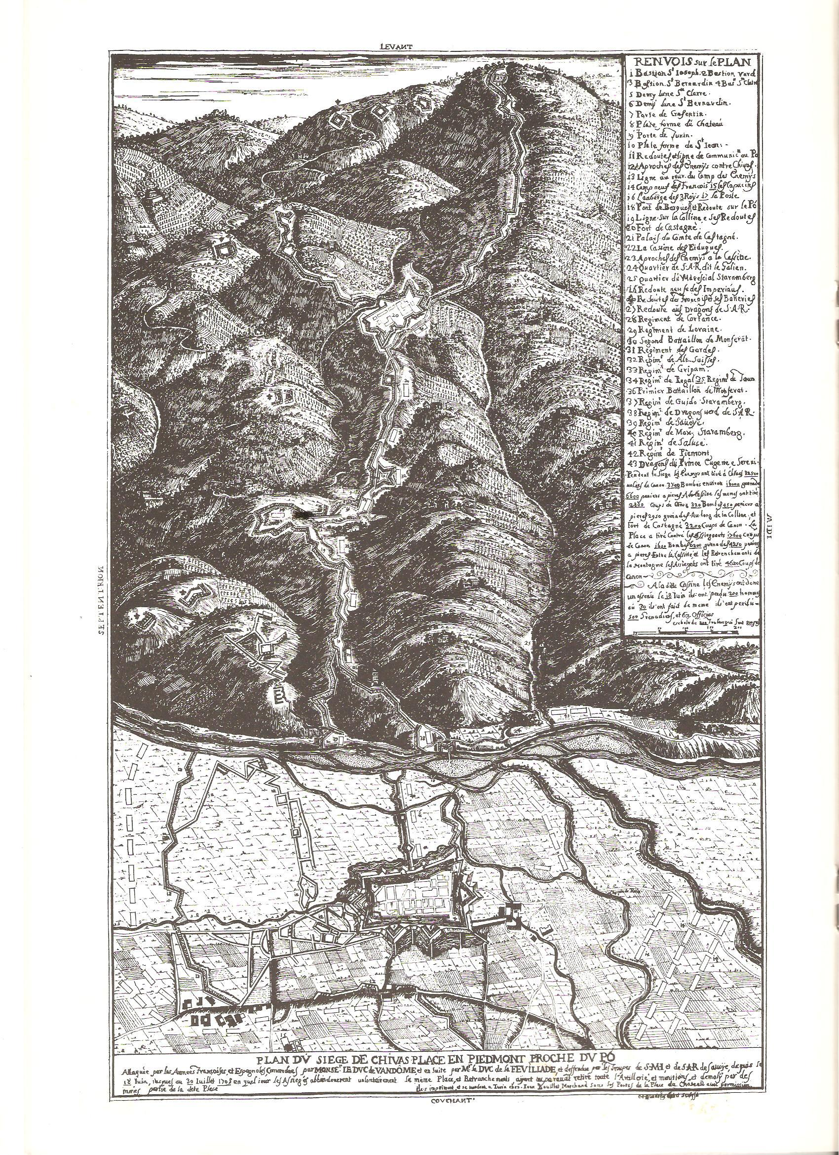 Plan du siege de Chivas. Place en Piedmont proche du Po...Ils s'imprient et se vendent a Turin chez Jean Bouillet, marchand sous les portes de la Place du Chateau avec permission